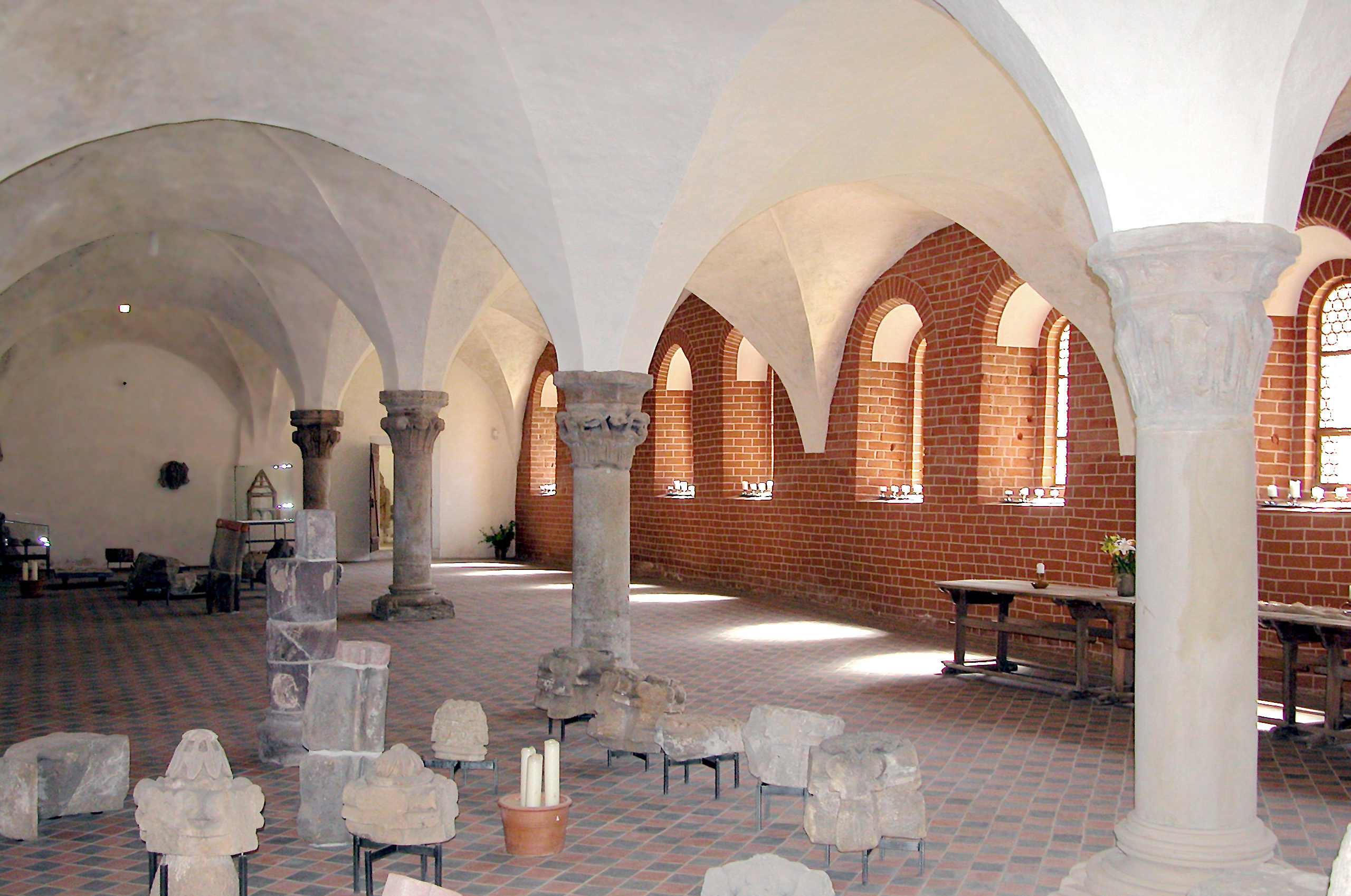 30.05.2003 01683 Altzella (Nossen): Kloster Altzella. Konversenhaus (GMP: 51.060562,13.276050). Ehemaliger Speisesaal (Refektorium) der Laienbrüder (Konversen) im Erdgeschoß. Hier als Lapidarium für alte Fundstücke genutzt [DSCNx.JPG]20030530420JPG(c)Blobelt